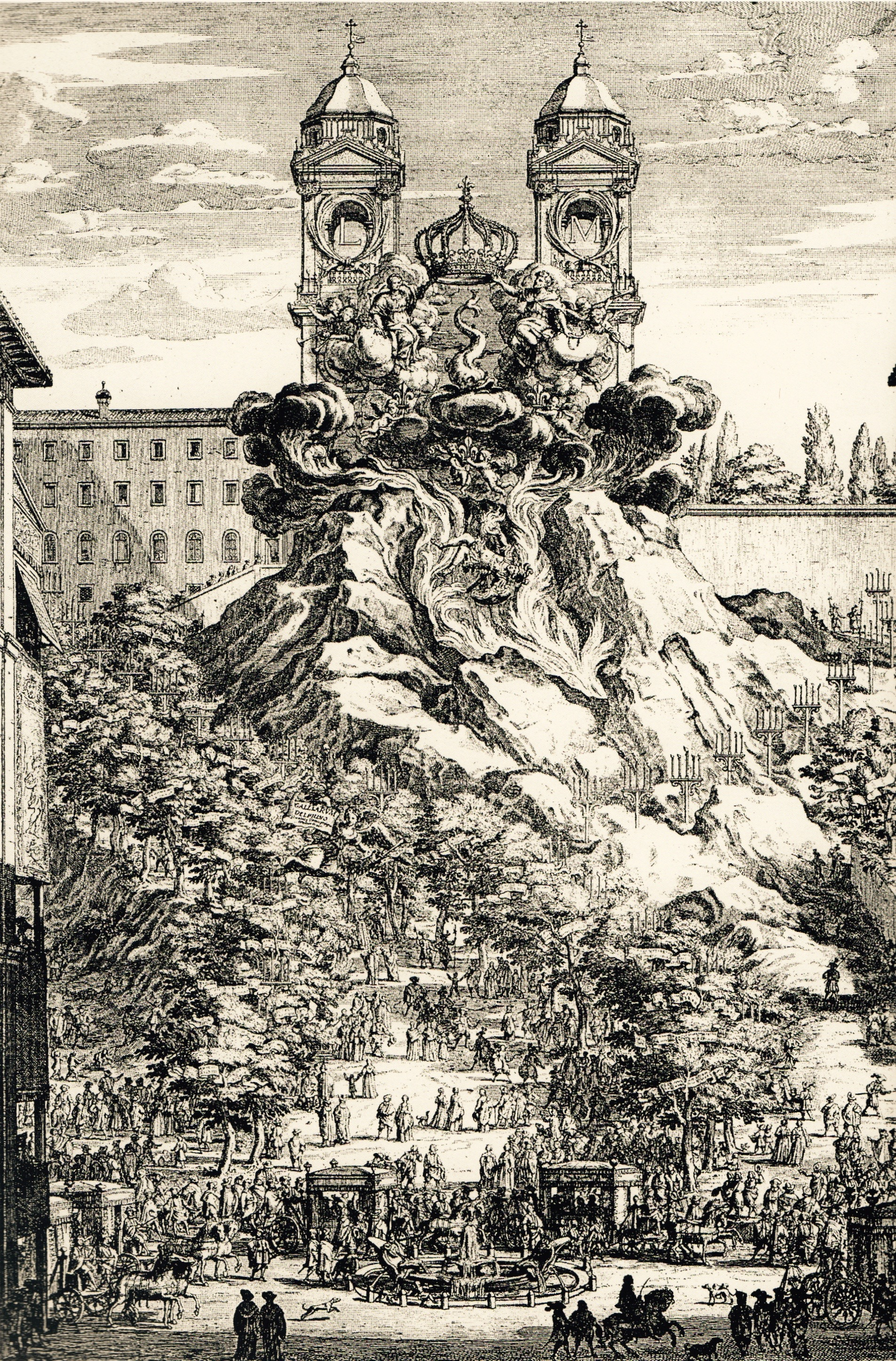 Riproduzione degli apparati festivi allestiti da Bernini e Giovan Paolo Schor a Trinità dei Monti per la nascita del Delfino di Francia